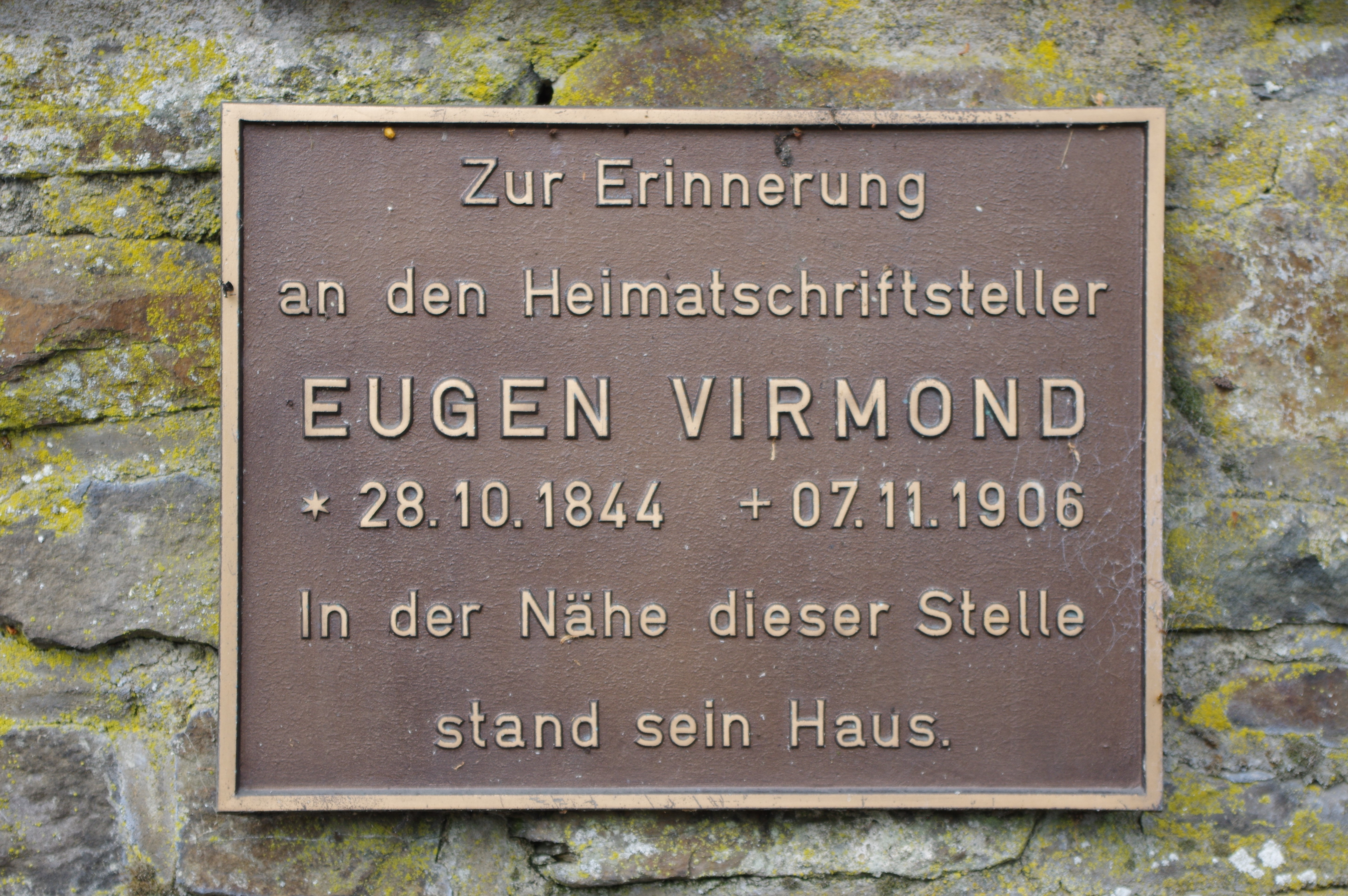 Hellenthal, Erinnerungstafel für Eugen Virmond (2017)